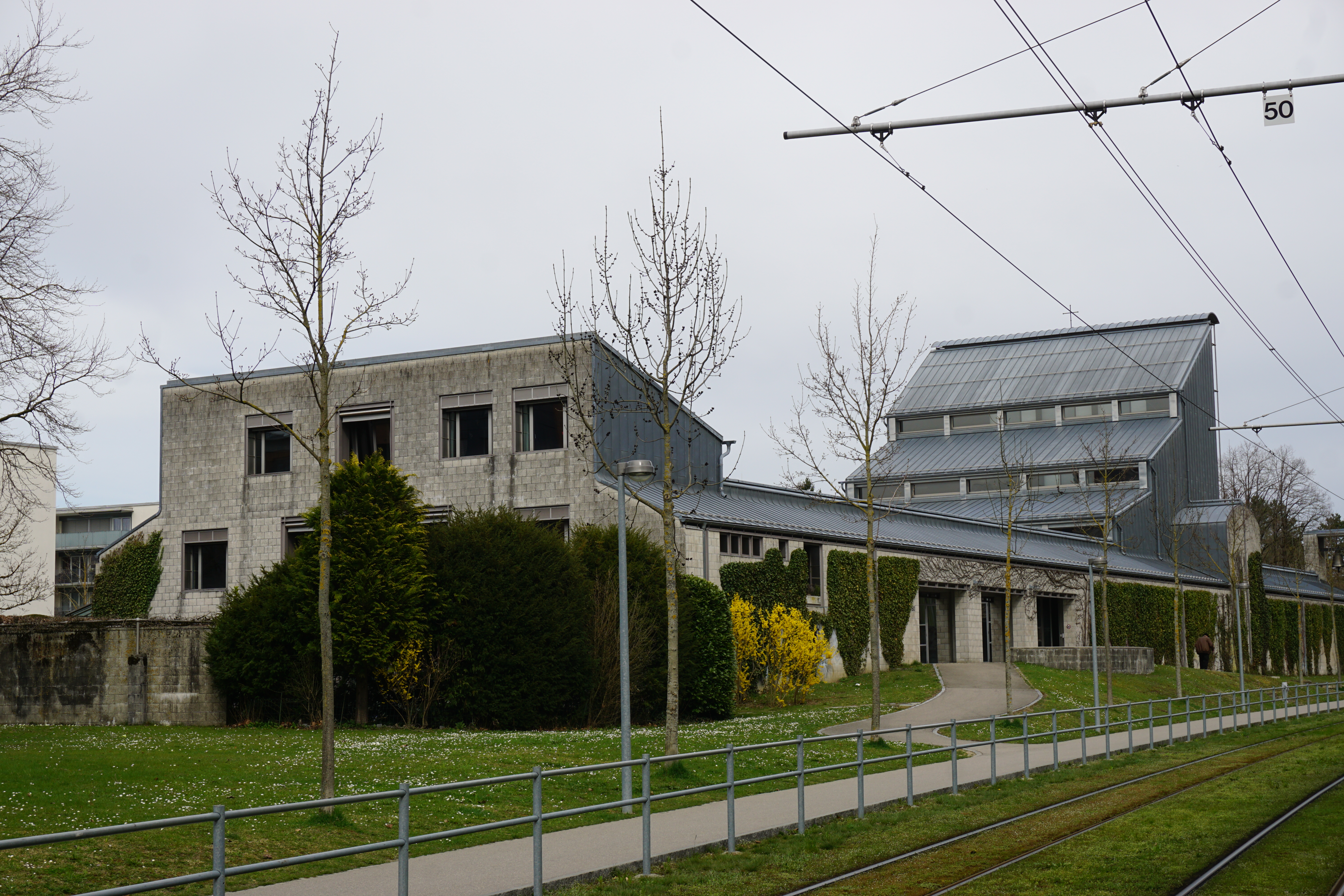 St. Mauritius, Übersicht von Südwest